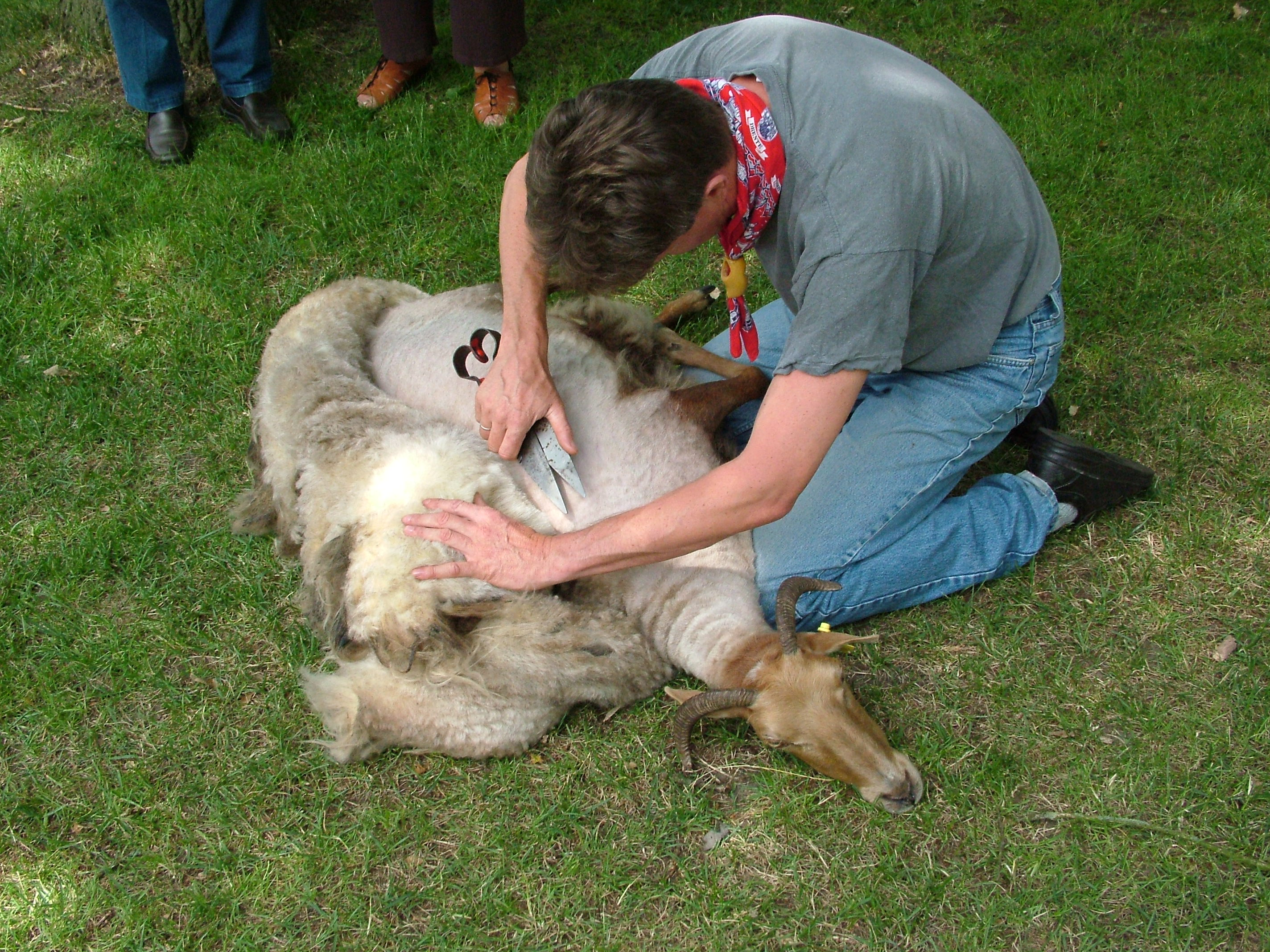 Schafscheren in Orvelte (Prov. Drenthe)